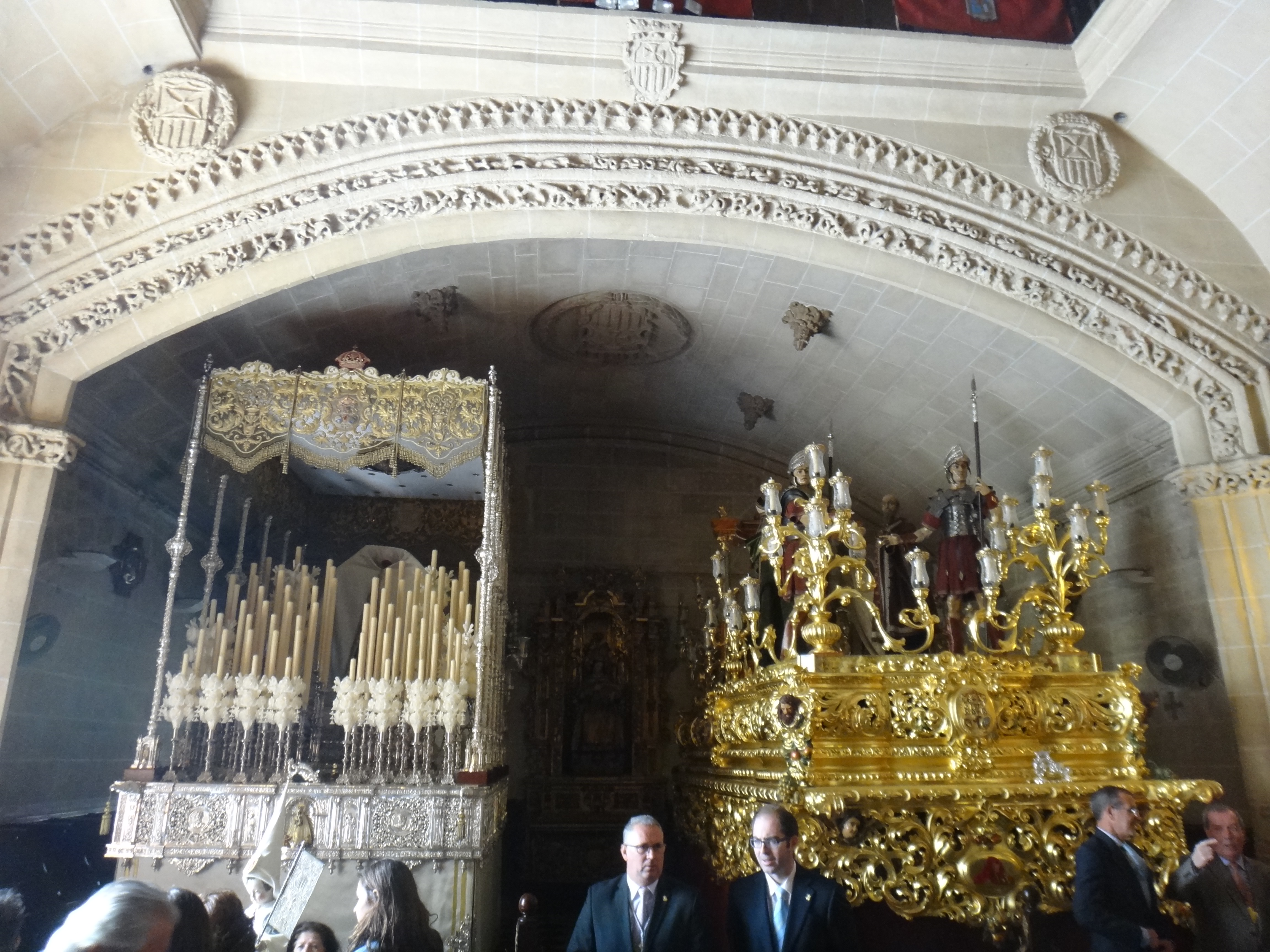 Basílica de La Merced de Jerez con Madre de Dios de la Misericordia en besamanos This is a photography of a Folklore festival in Spain (Wikidata id Q6124533).